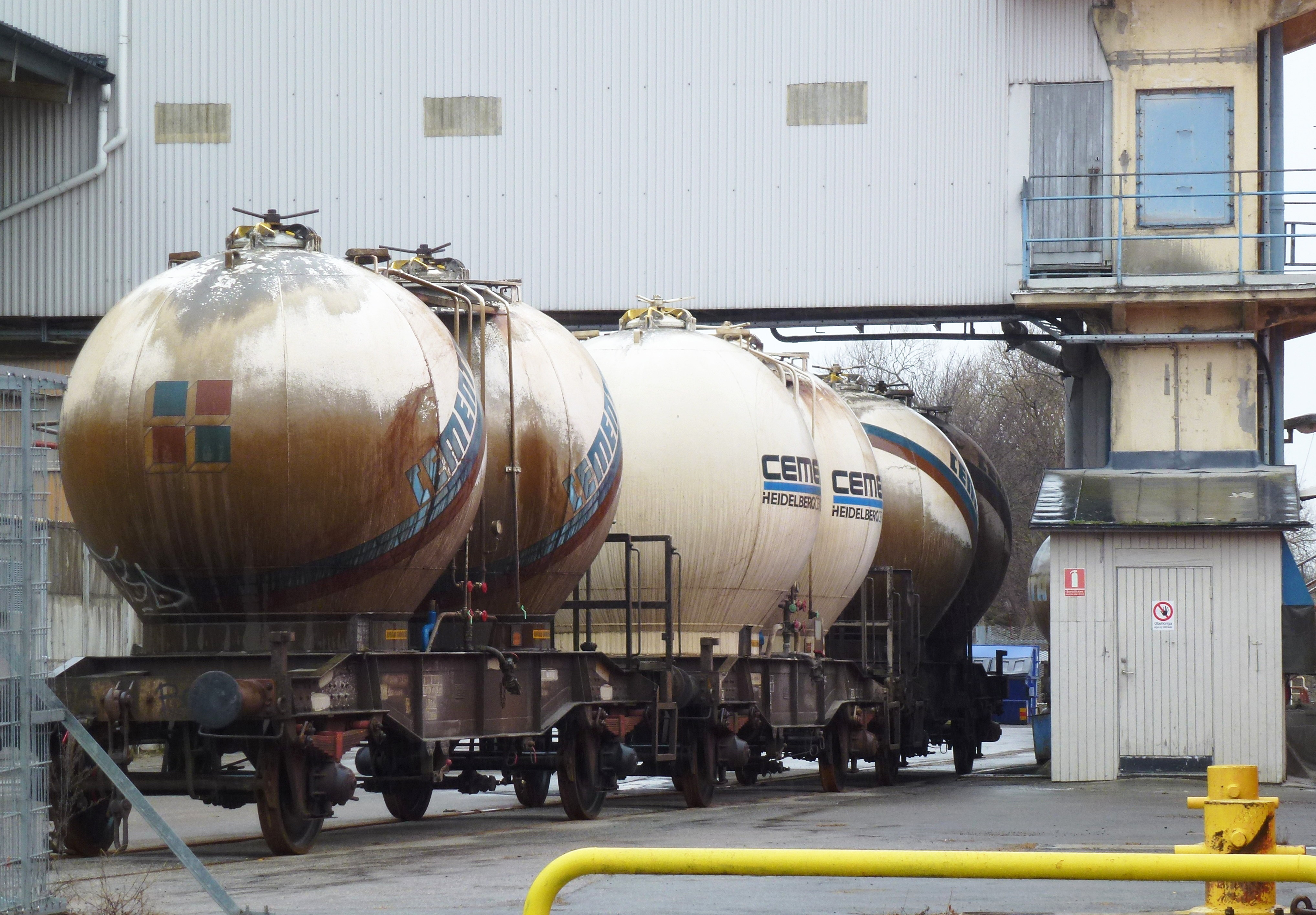 Cementa Liljeholmen, kajen, hamnen, cementtåg